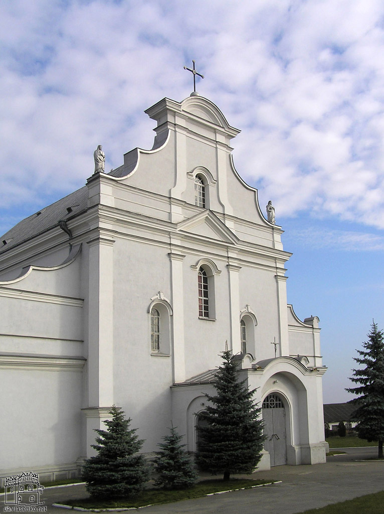 КОСТЕЛ ФЛОРИАНА ШАРОГО , XVIII: Костел в Шаргороді Костел в стиле барокко из камня и кирпича. В плане трехнефная четырехстолпная базилика. Главный фасад увенчан барочным фронтоном. В интерьере сохранилось четырнадцать горельефных композиций XIX в., в восточной части — две деревянные полихромные скульптуры XVIII в., а также резная кафедра XVIII в. На сводах и стенах восточной части сохранилась живопись, выполненная в 1895—1899 гг. худож. А. Тенчинским и расчищенная в 1963 г. Главный вход на территорию памятника решен в виде трехпролетной арки, завершенной барочным фронтоном, в тимпане которого в нише установлена полмхромная фигура.